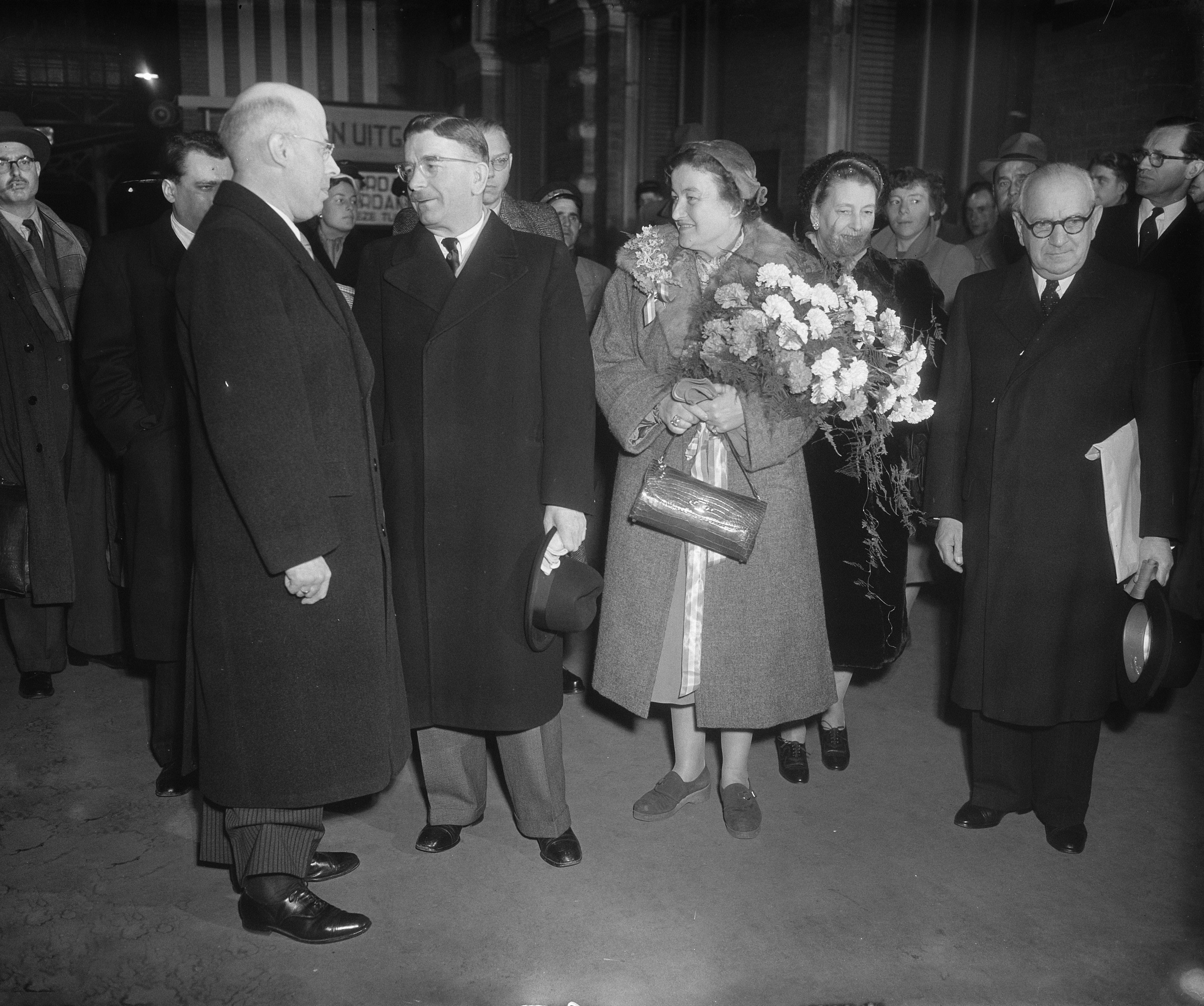 Collectie / Archief : Fotocollectie Anefo Reportage / Serie : [ onbekend ] Beschrijving : Aankomst Bondskanselier Dr. Figl van Oostenrijk in Den Haag, met Minister Beel Consul Saeman Datum : 21 oktober 1952 Locatie : Den Haag Trefwoorden : ministers-presidenten Persoonsnaam : Beel, L.J.M., Figl, Leopold Fotograaf : Noske, J.D. / Anefo Auteursrechthebbende : Nationaal Archief Materiaalsoort : Glasnegatief Nummer archiefinventaris : bekijk toegang 2.24.01.09 Bestanddeelnummer : 905-3722